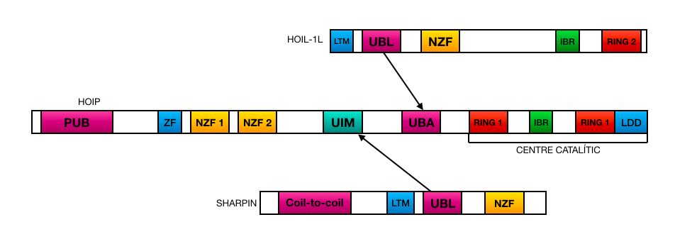 Estructura de les diferents components del LUBAC complex i entre quins dominis es produeixen els enllaços entre la unitat principal i les dues subunitats secundàries.